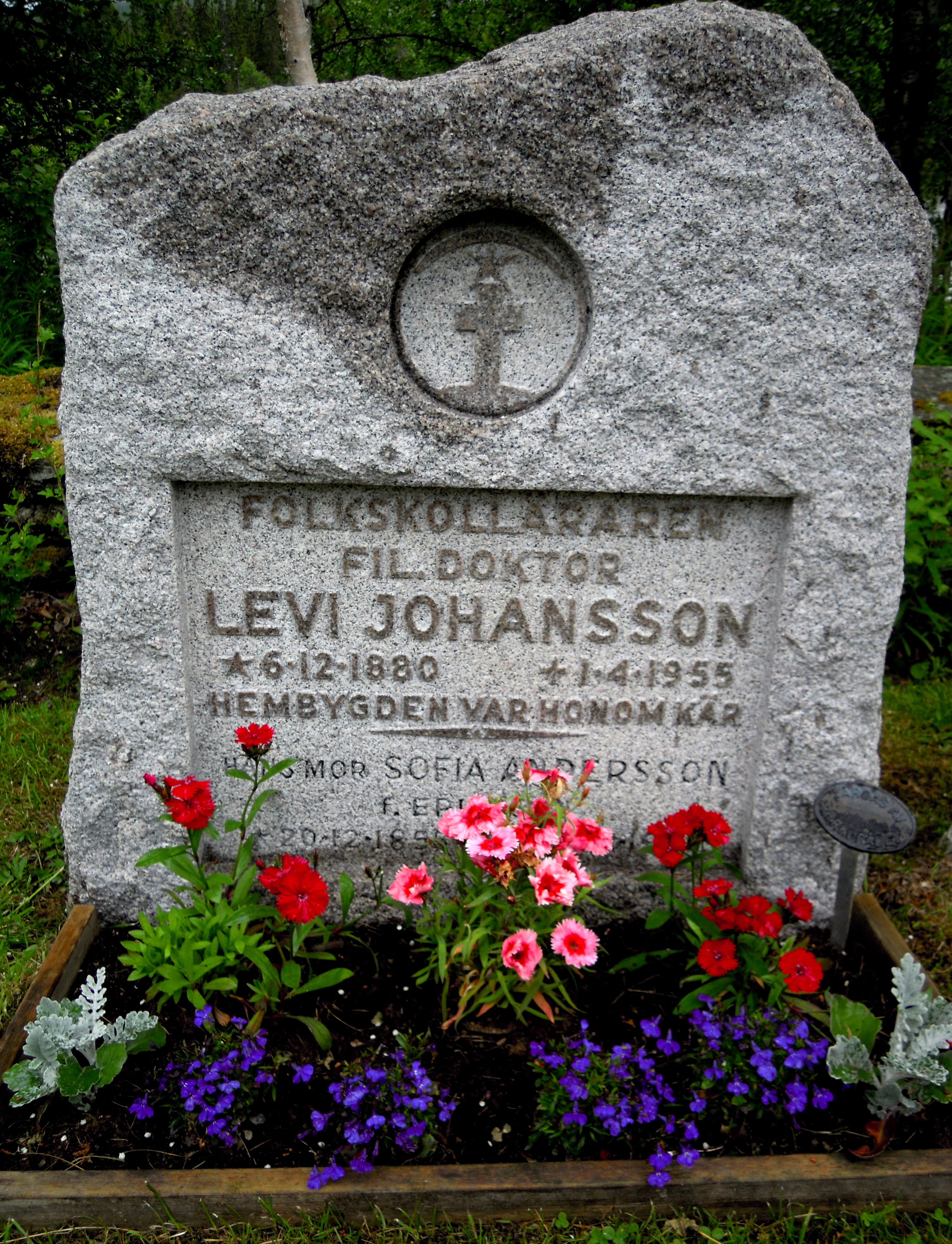 Folklivsforskaren Levi Johanssons gravsten på Ankarede kyrkogård.